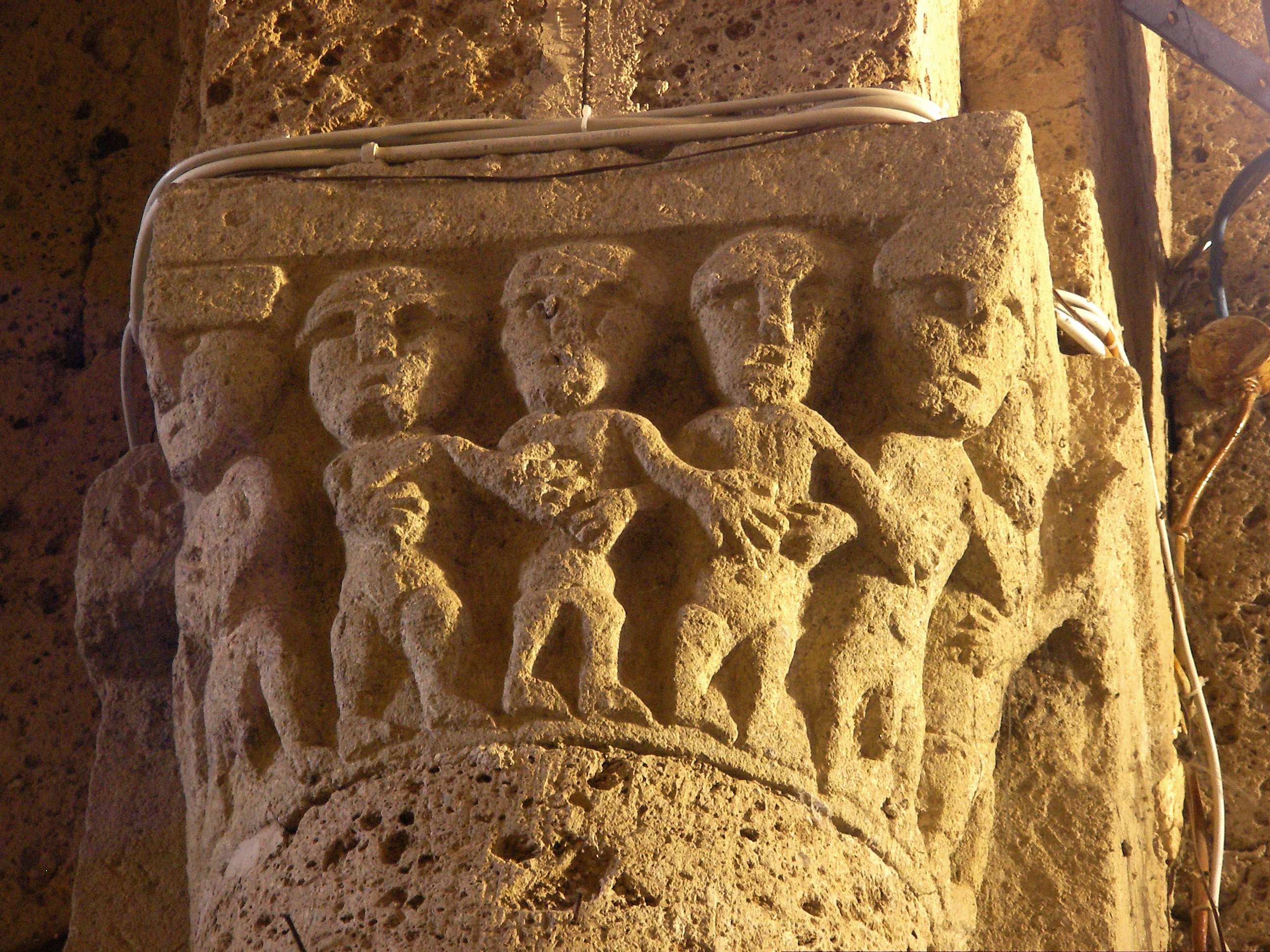 Langobardic Capital in Basilica Sant'Elia, Castel Sant'Elia, Italy